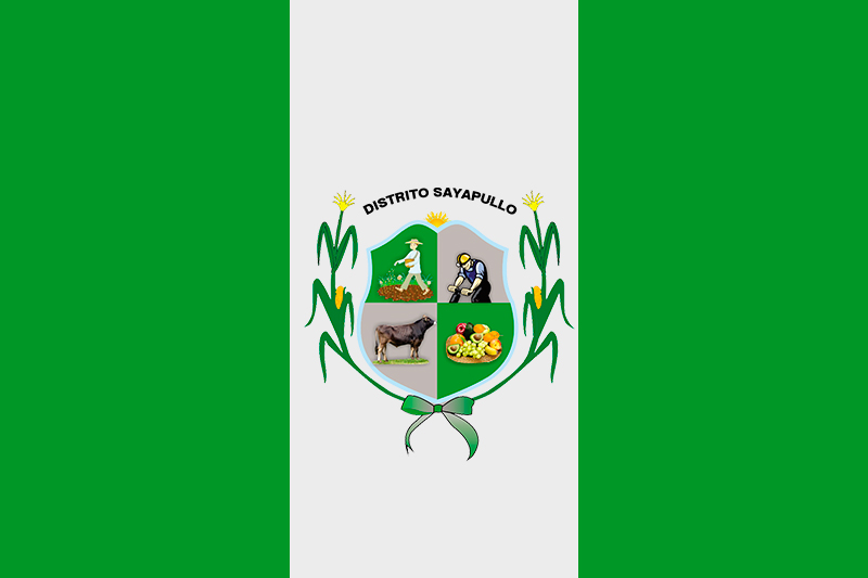 Bandera del Distrito de Sayapullo